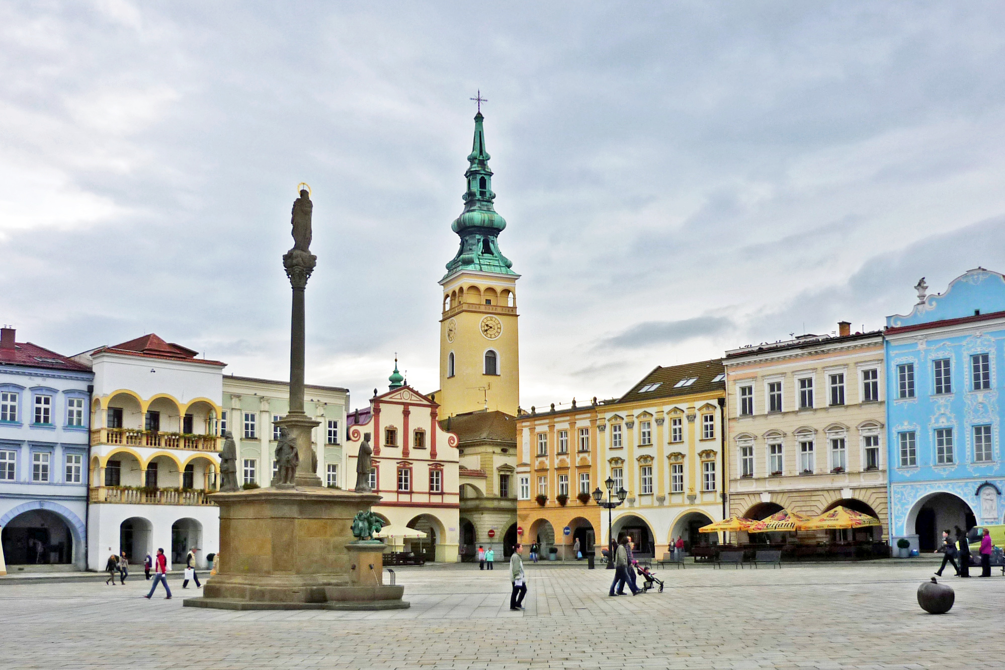 Gebäude am Ring in Neutitschein (Nový Jičín), Pfarrkirche und Mariensäule